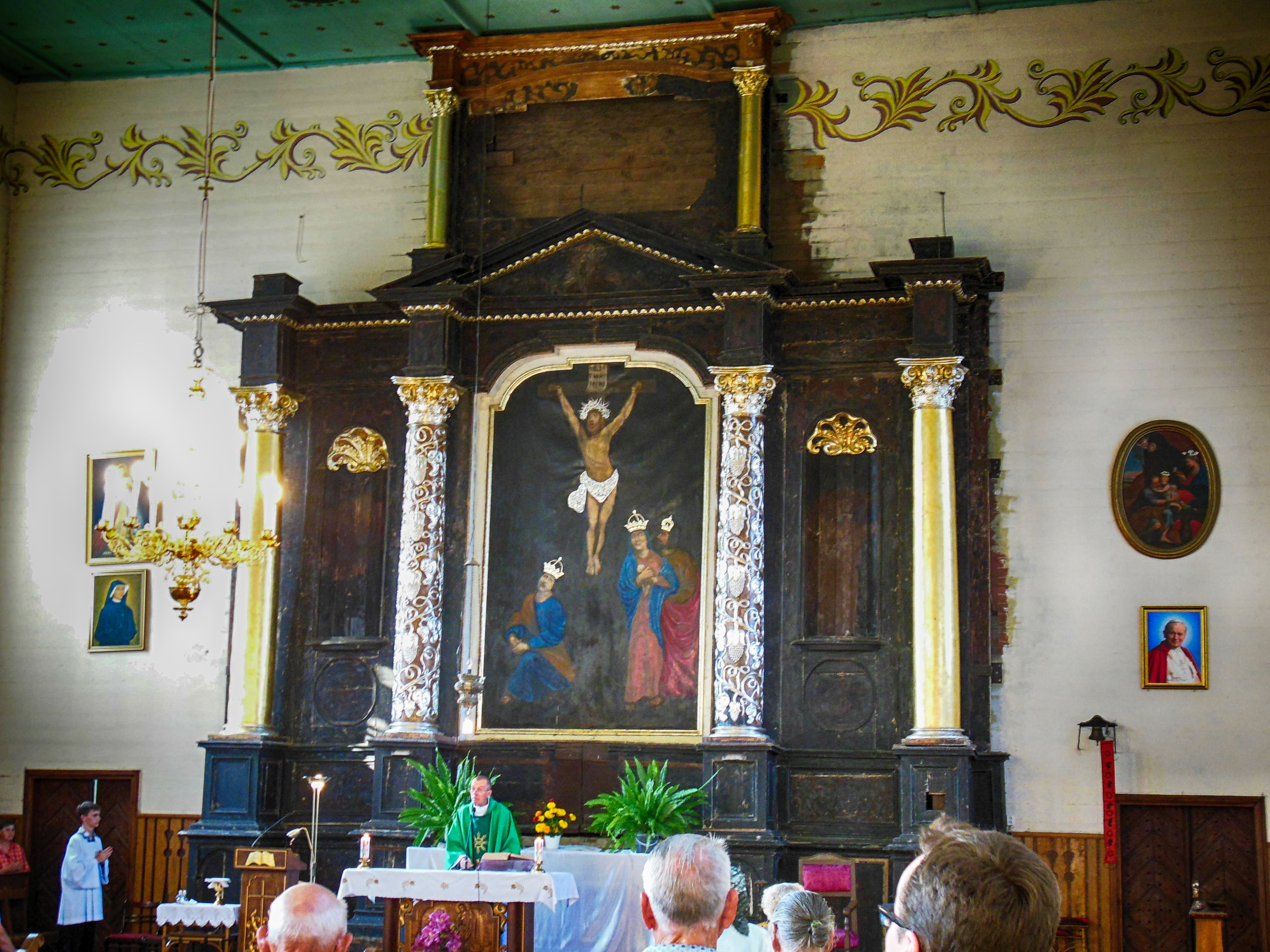 Беларуская (тарашкевіца): Касьцёл Яна Хрысьціцеля галоўны і бакавы алтары. в. Воўпа This is a photo of Belarusian heritage monument. Reference number: 412Г000093 ( WLM)